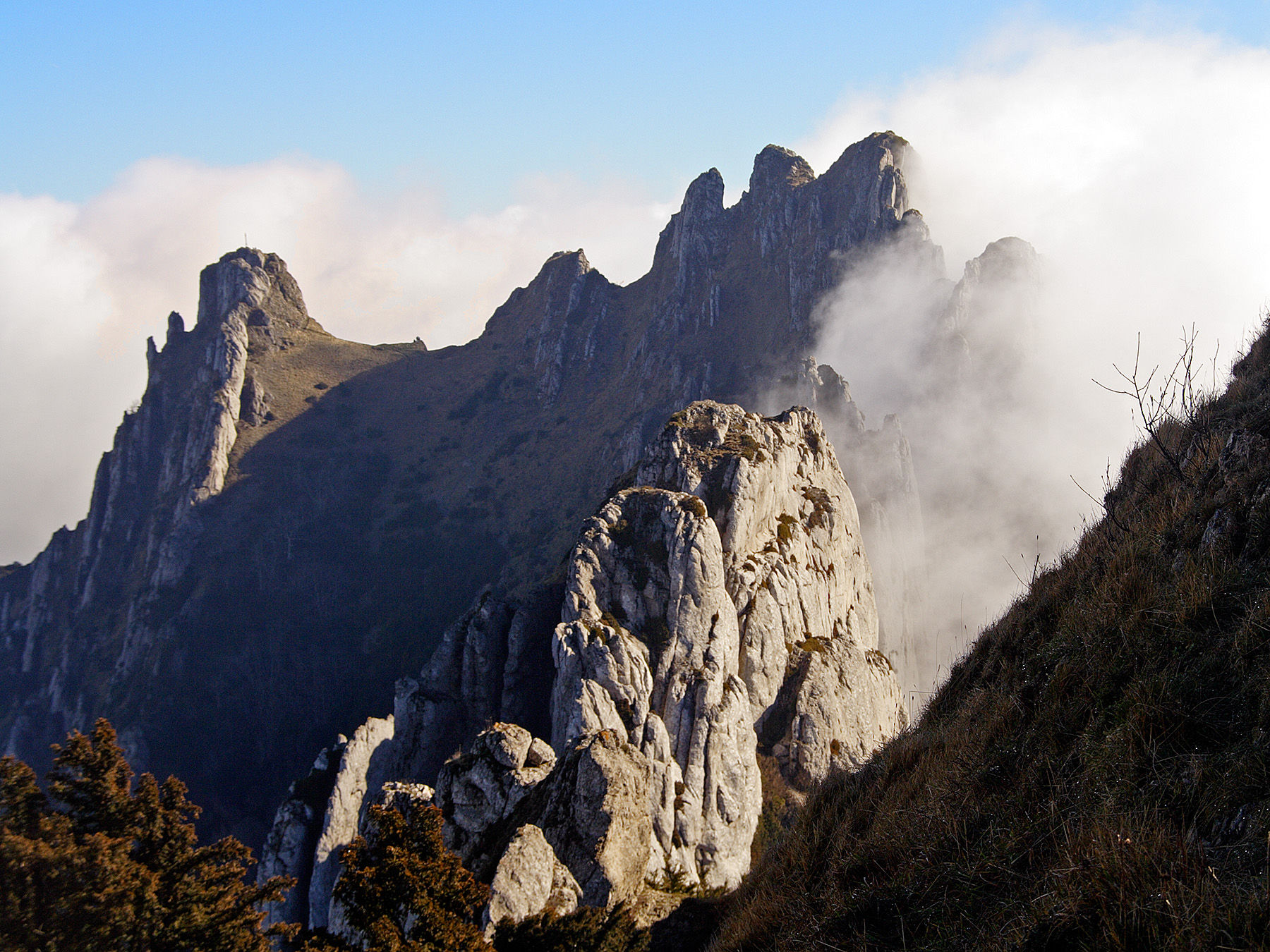 Cruz del Castillo eta Larrasa mendien tontorrak.